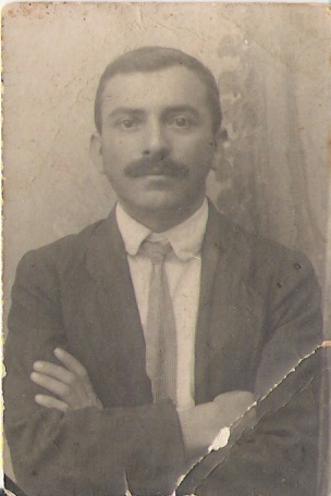 תמונת פורטרט